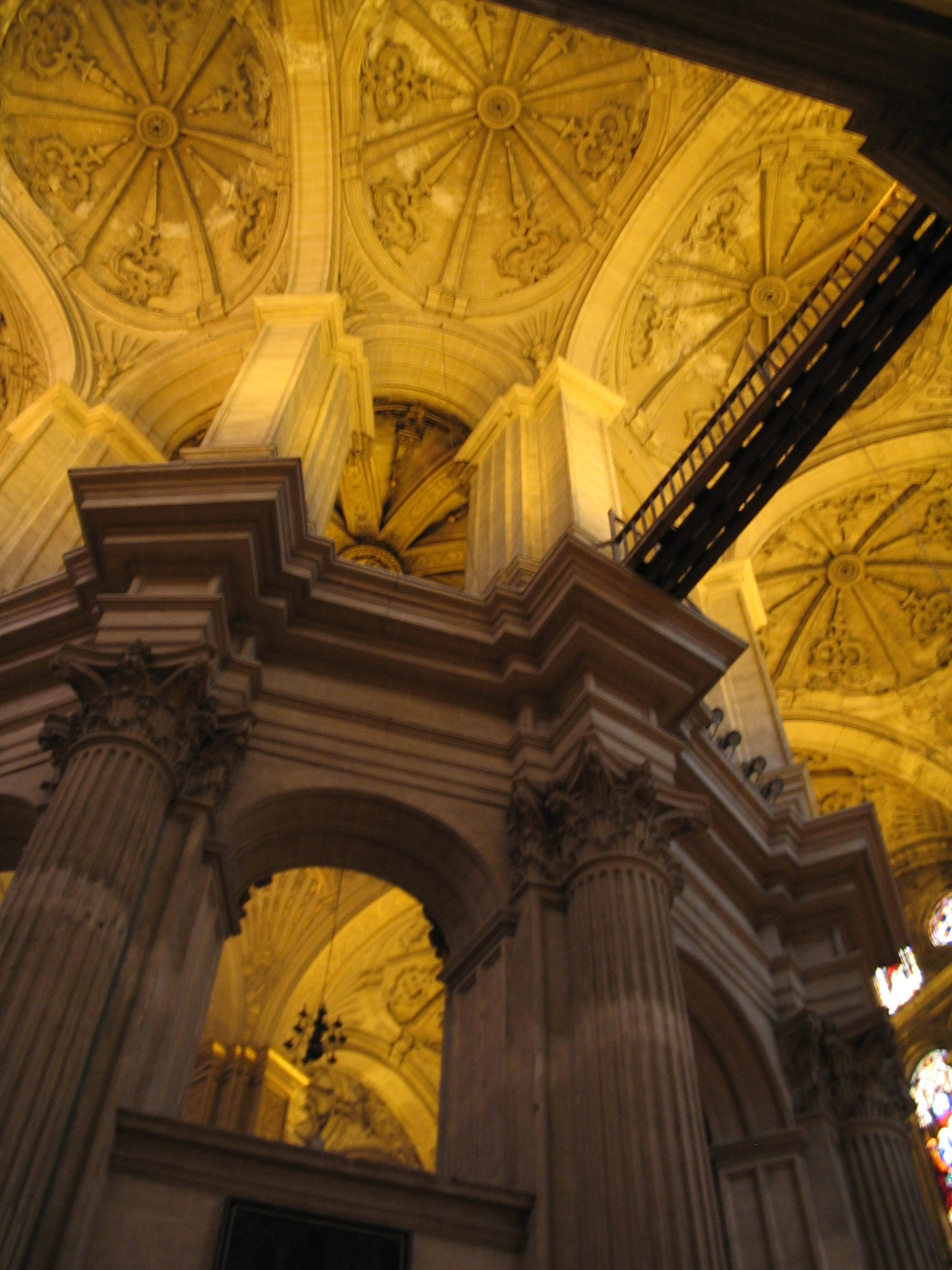 Cathédrale de Malaga, intérieur